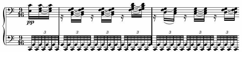 Description : quatrième variation de l'arietta de la sonate pour piano n° 32 de Beethoven Auteur : propre travail réalisé avec Lilypond Licence : domaie public (auteur décédé depuis plus de 70 ans)